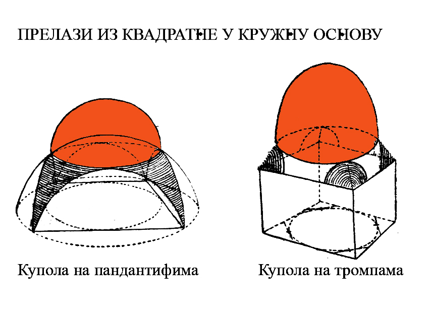 skica prelaza iz kvadratne u kružnu osnovu za kupolu pandantifi i trompe